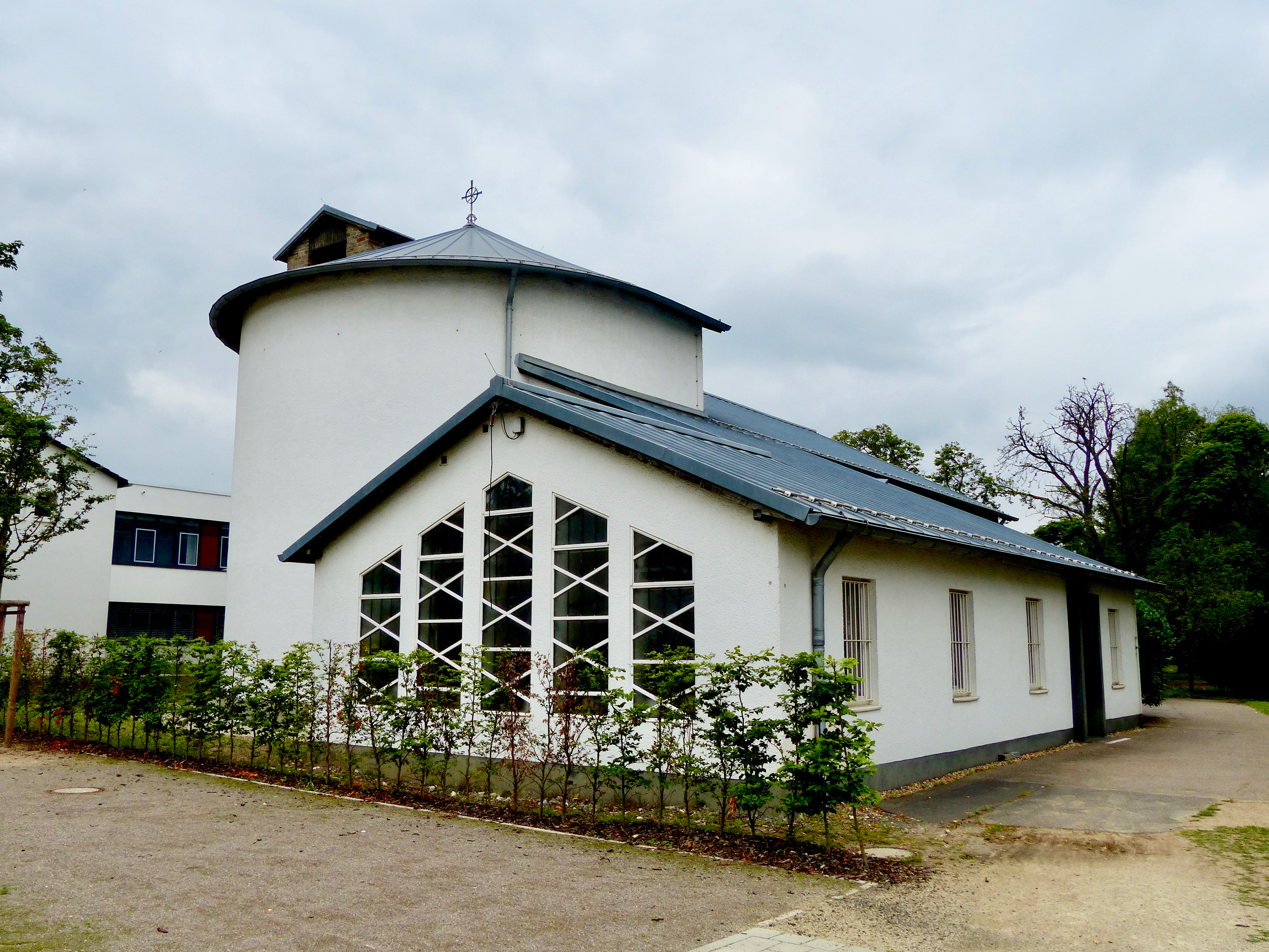 Riehler Heimstätten (2017): Kirche St. Anna